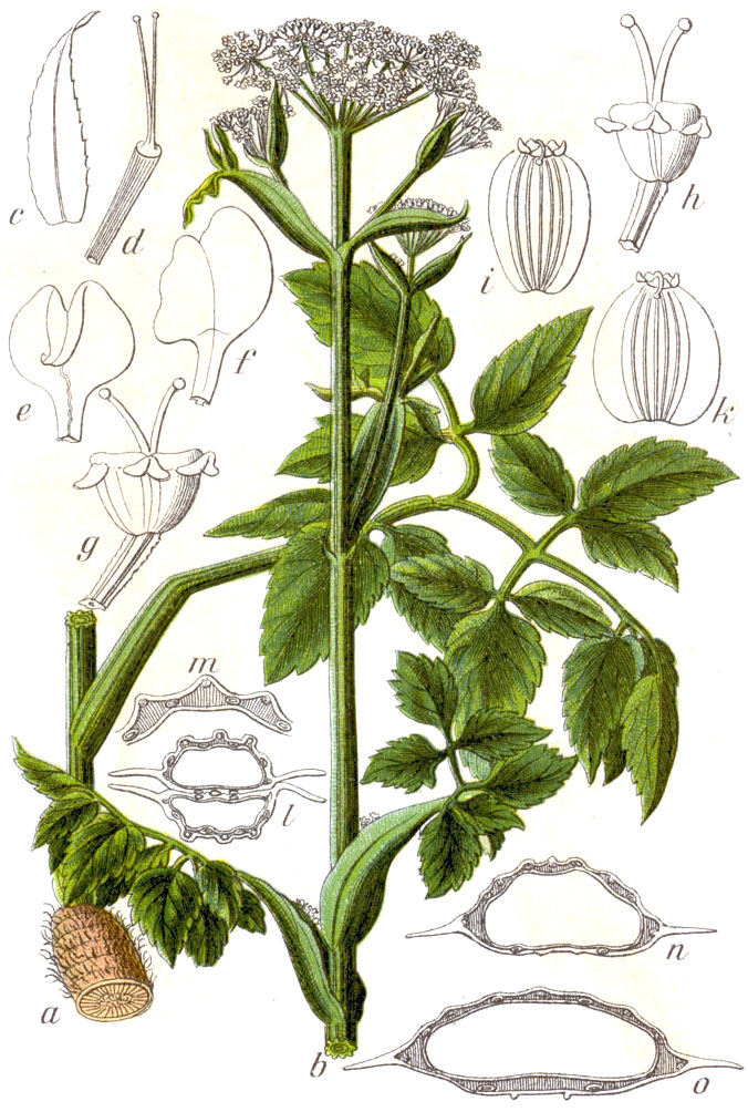 "Sumpf-Engelwurz", Angelica palustris (Besser) Hoffm., syn. Ostericum palustre (Besser) Besser Original caption Kantige Angelika, Ostericum palustre